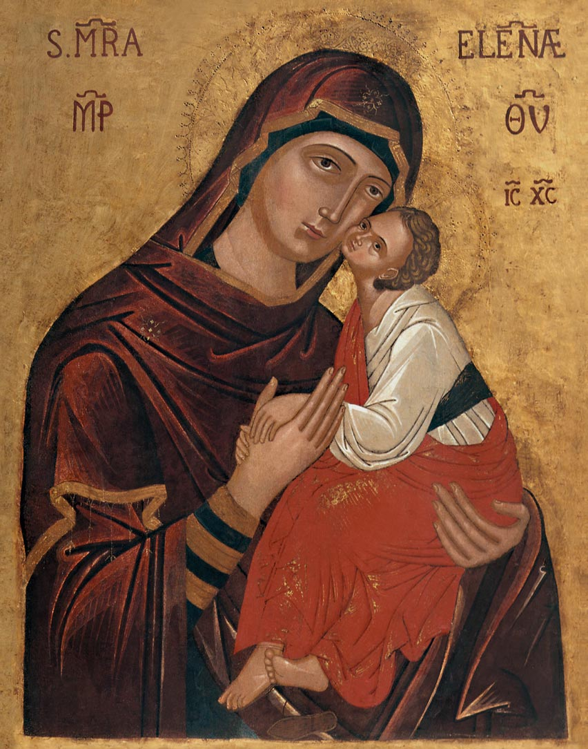 Icona di Maria SS. dell'Elemosina - Madre della Divina Misericordia che si venera nella Basilica Santuario di Biancavilla (Ct)